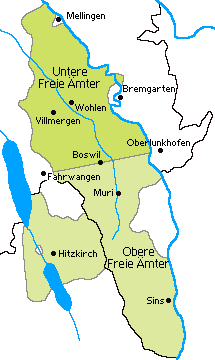 Teilung der Freien Ämter im Jahr 1712